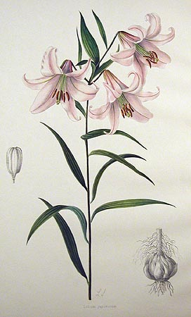 Lilium japonicum handcolorierte Lithographie von Henry John Elwes (1846-1922) aus dem Jahre 1877